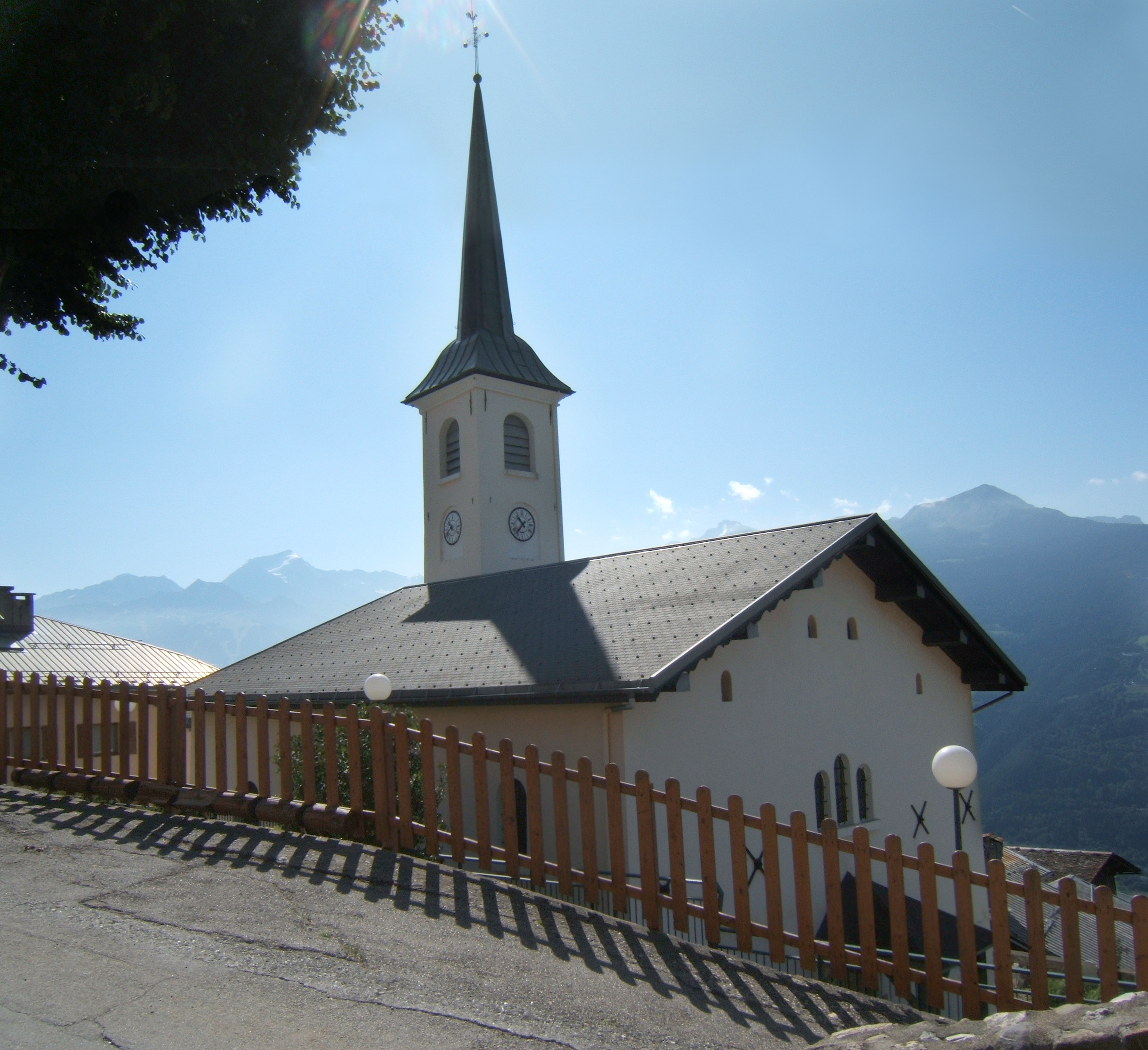 L'église Saint-Barthélémy de Granier, en Savoie. Ce village se situe au-dessus de la ville d'Aime, sur le versant de l'adret.